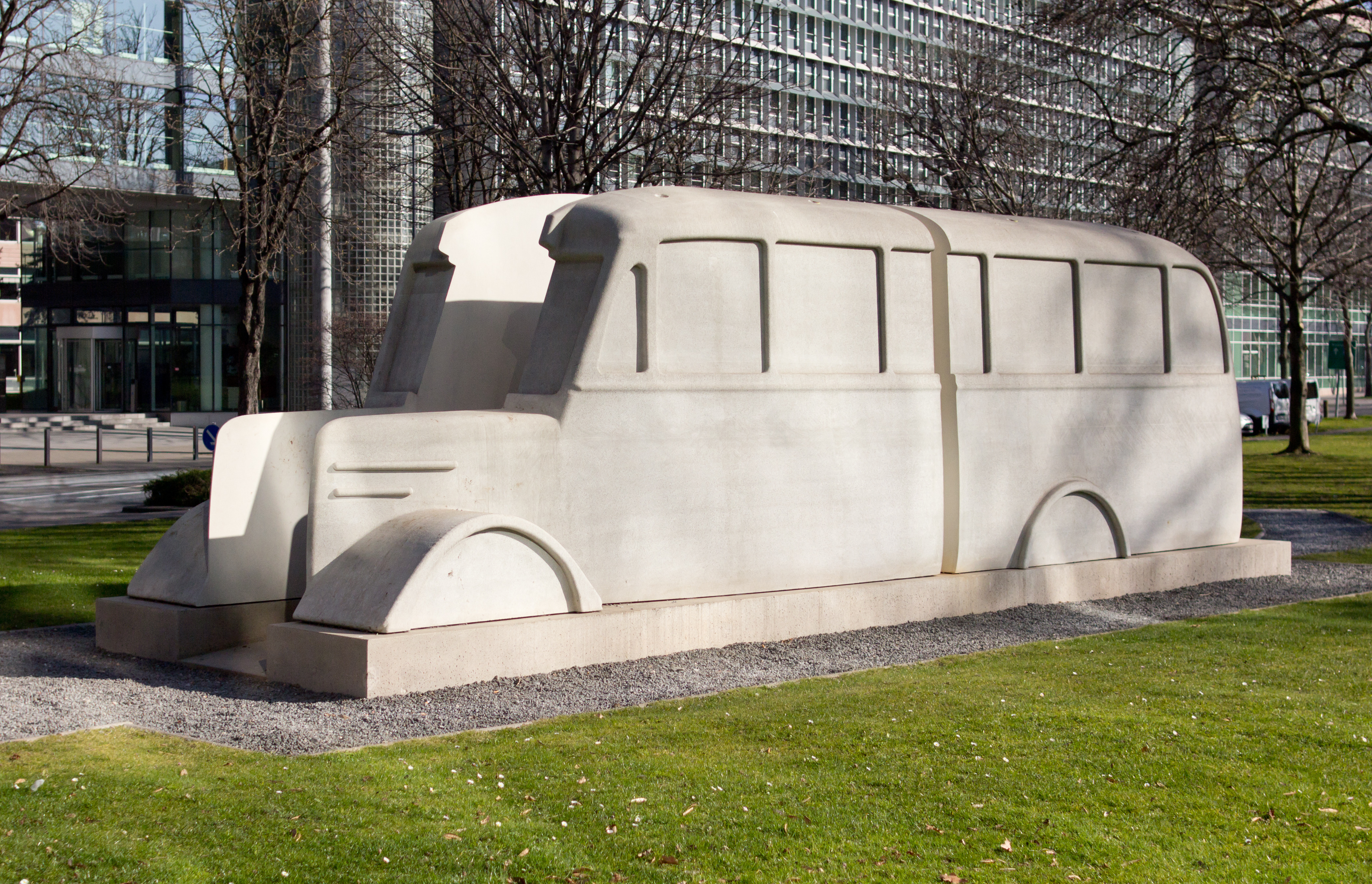 Denkmal der grauen Busse, von Horst Hoheisel und Andreas Knitz, Replika, dauerhaft platziert vor dem Landeshaus des LVR in Köln-Deutz.